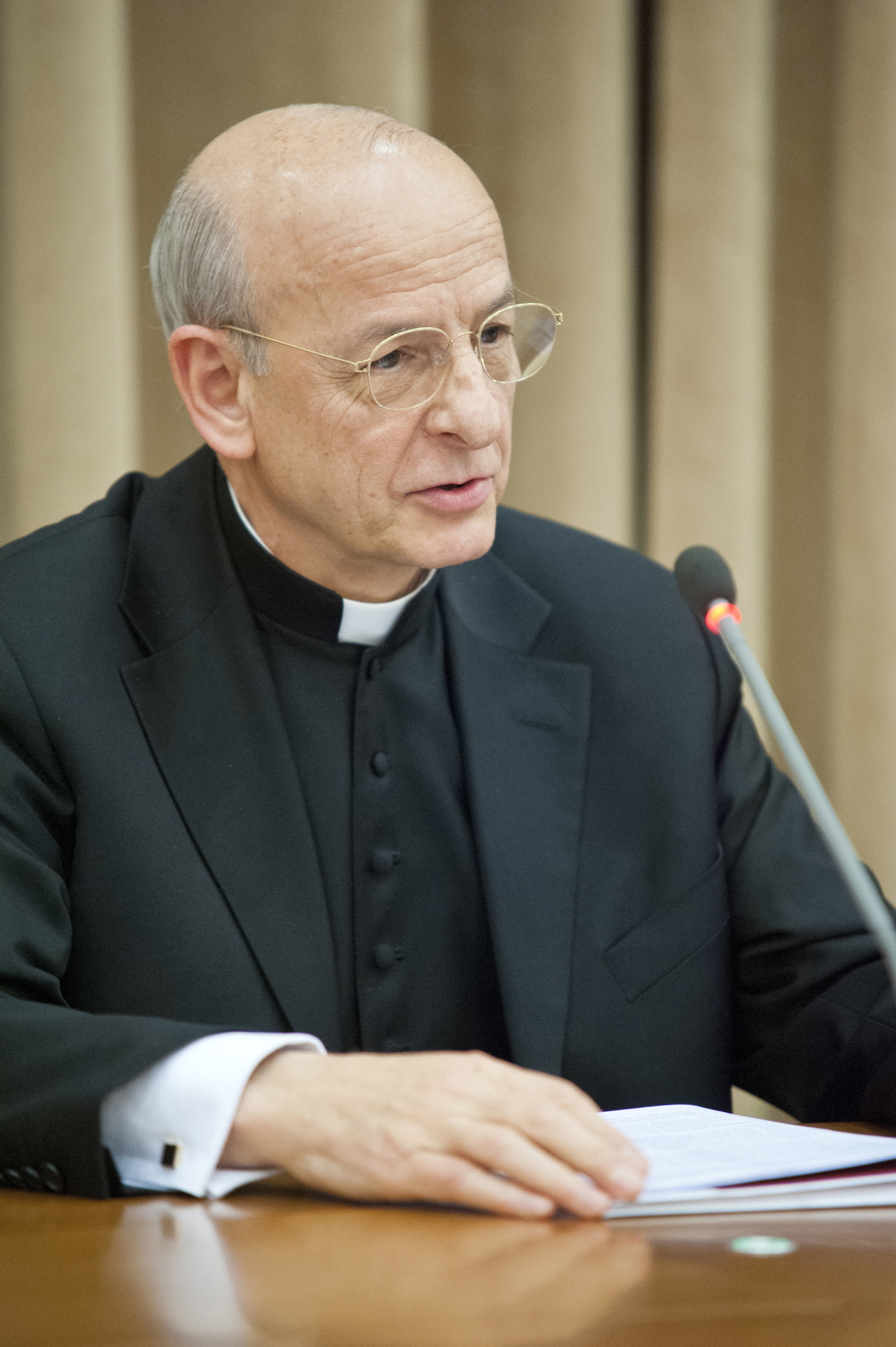 Prelato dell'Opus Dei